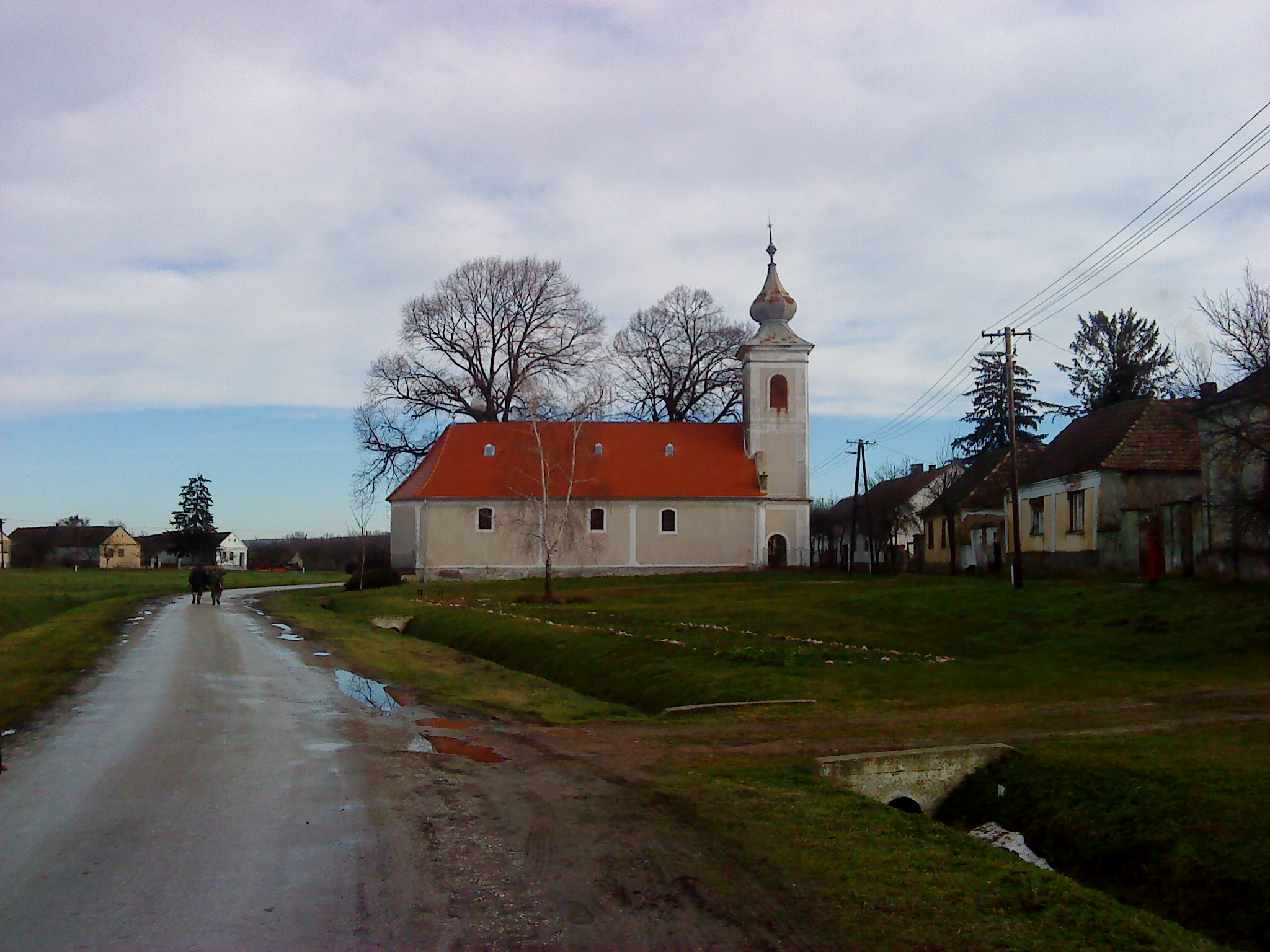 Kórósi református templom